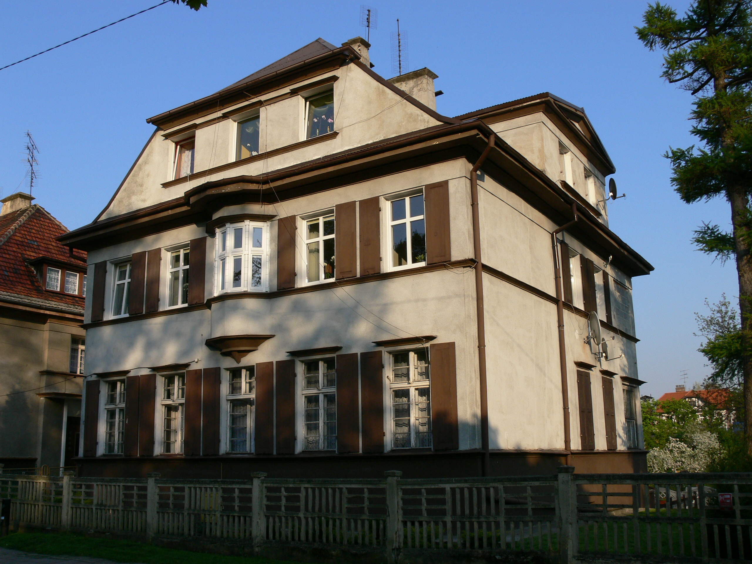 Racibórz — willa przy ul. Bema 14